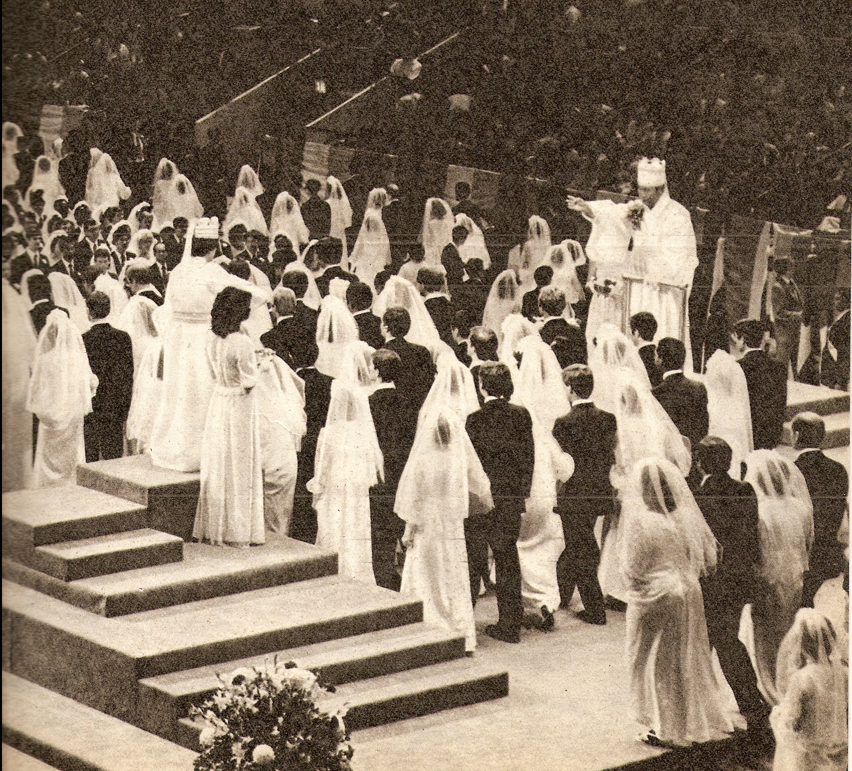 boda colectiva oficiada por sun myung moon